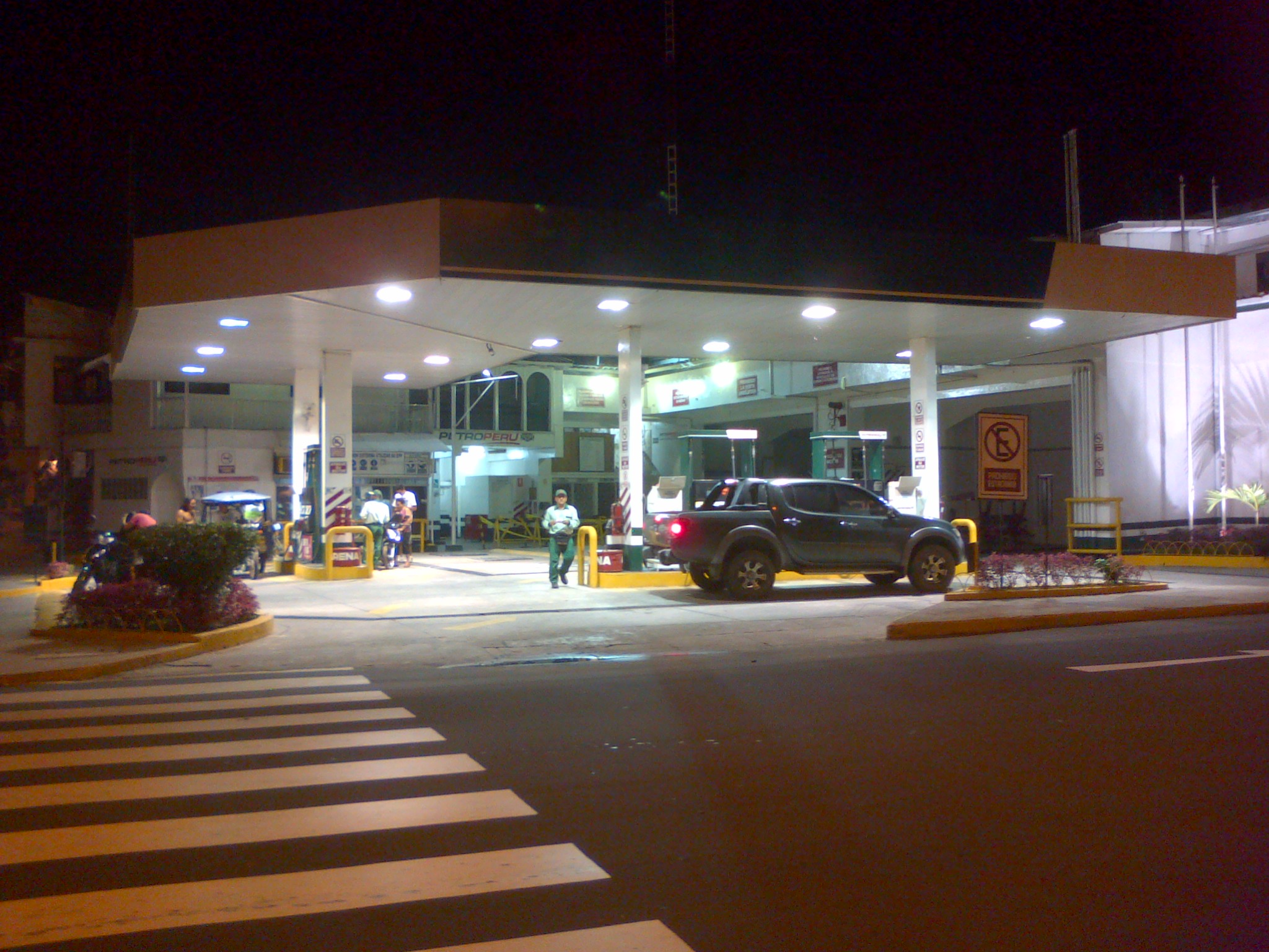 Gasolinera de Petroperú en Iquitos